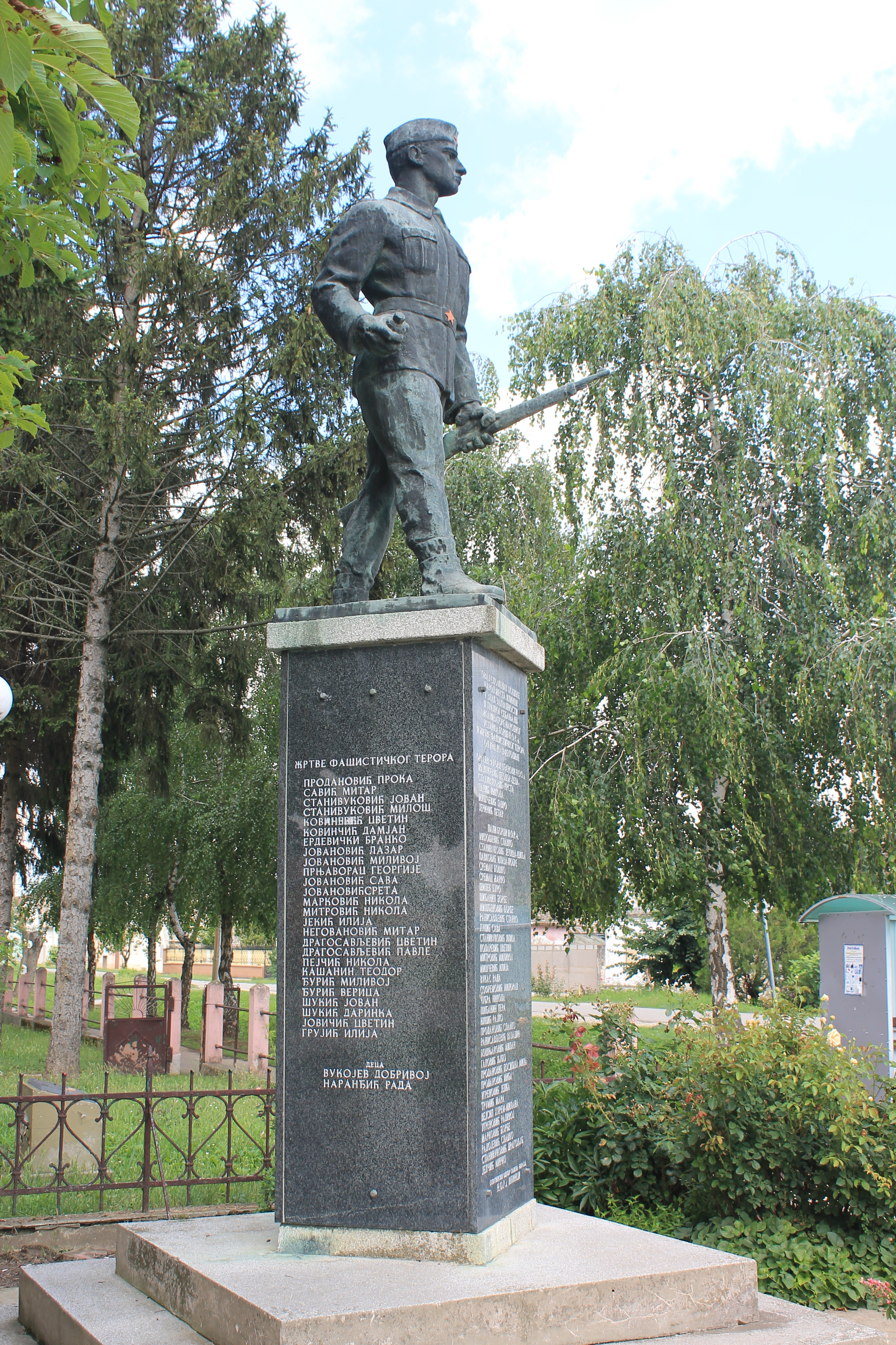 Ilinci